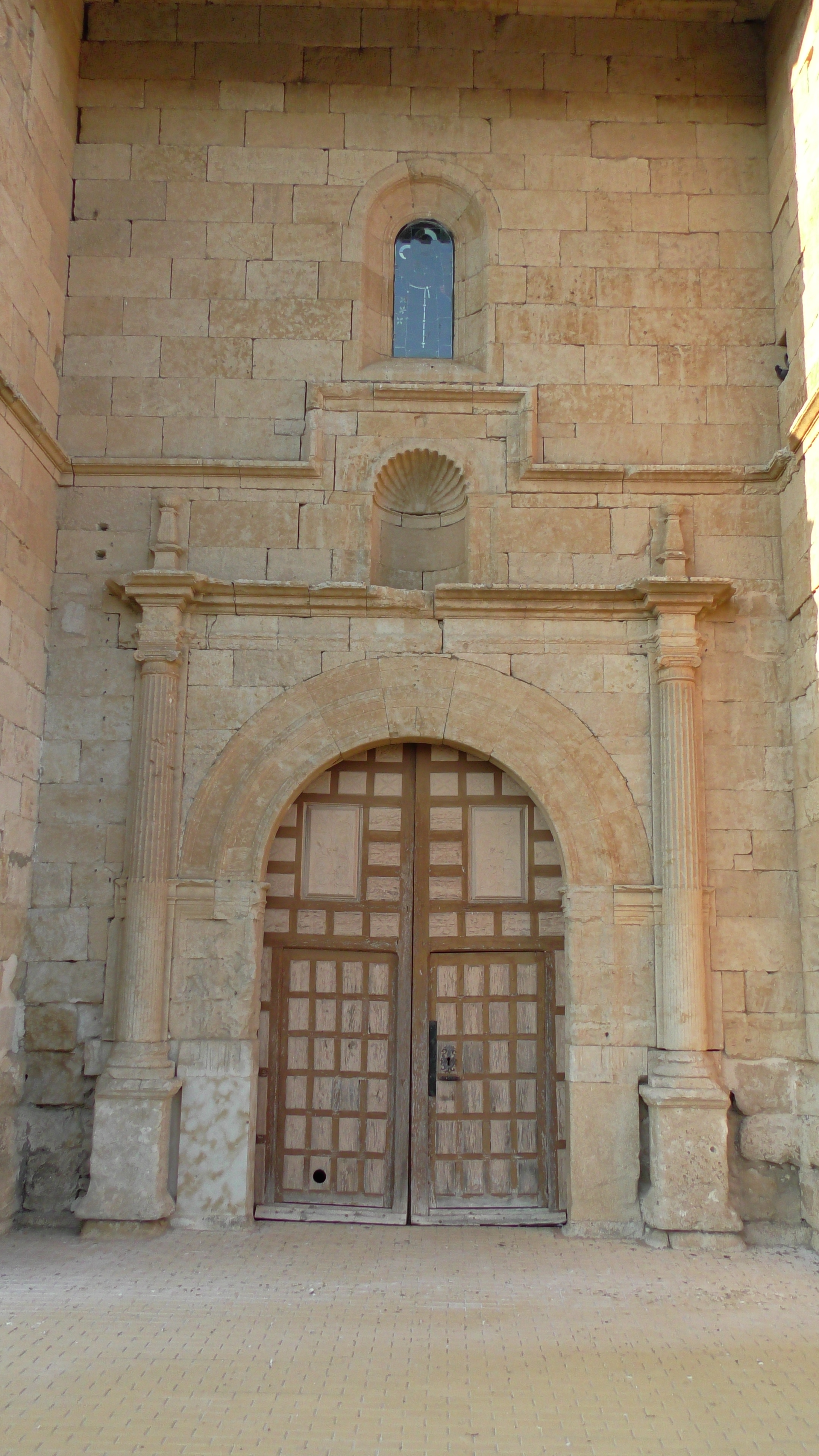 Argujillo